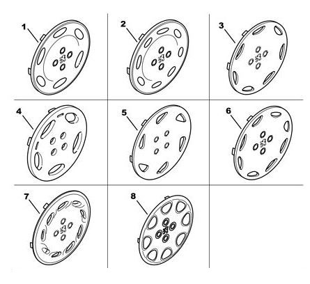 enjoliveur